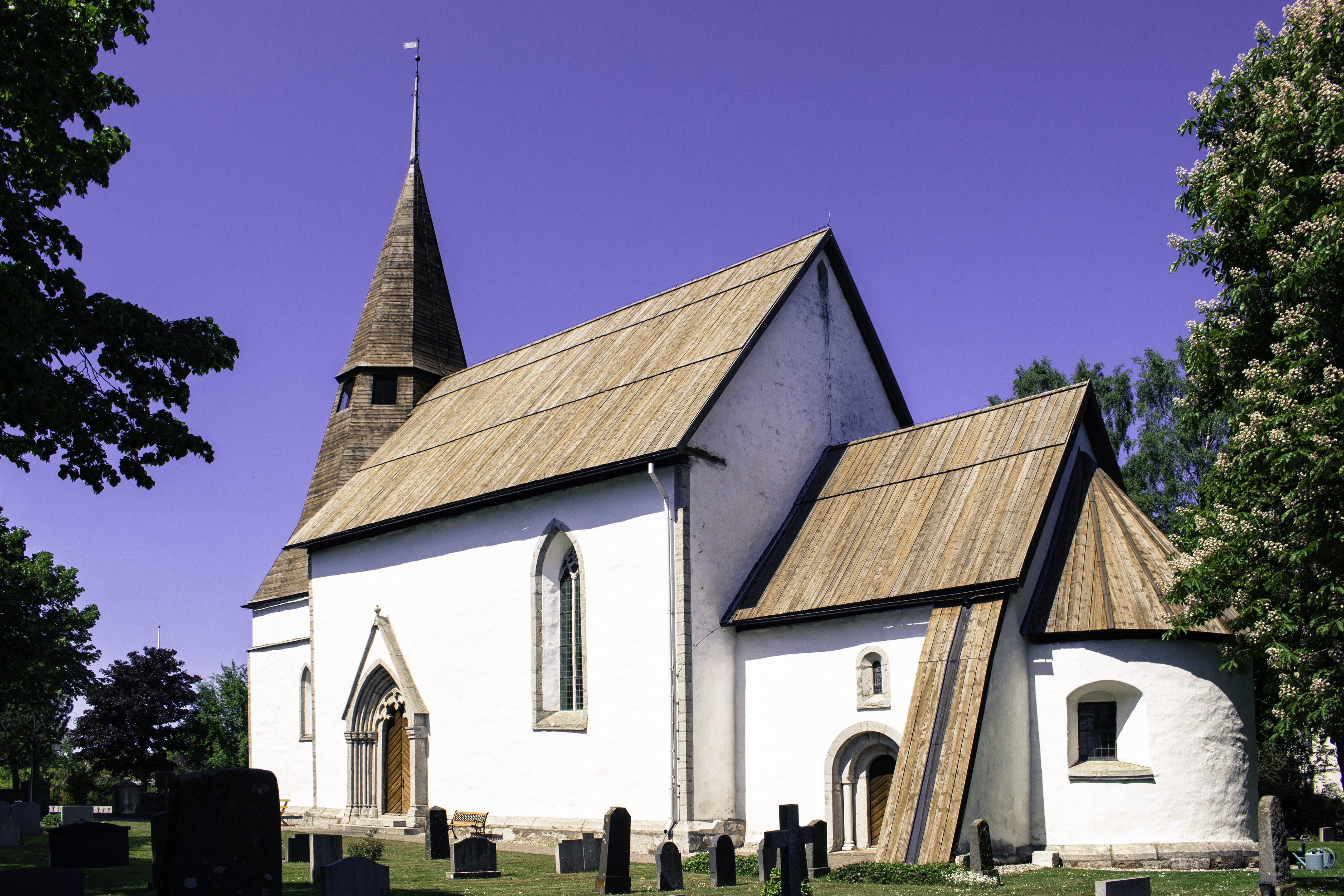 Igrexa de Gerum, na illa sueca de Gotland.